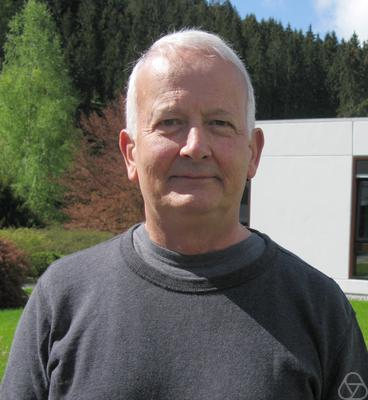 Foto di William Jaco